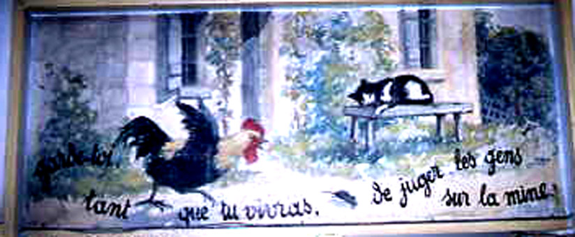 Illustration de la fable de Jean de La Fontaine Le cochet, le chat et le souriceau Livre VI fable V